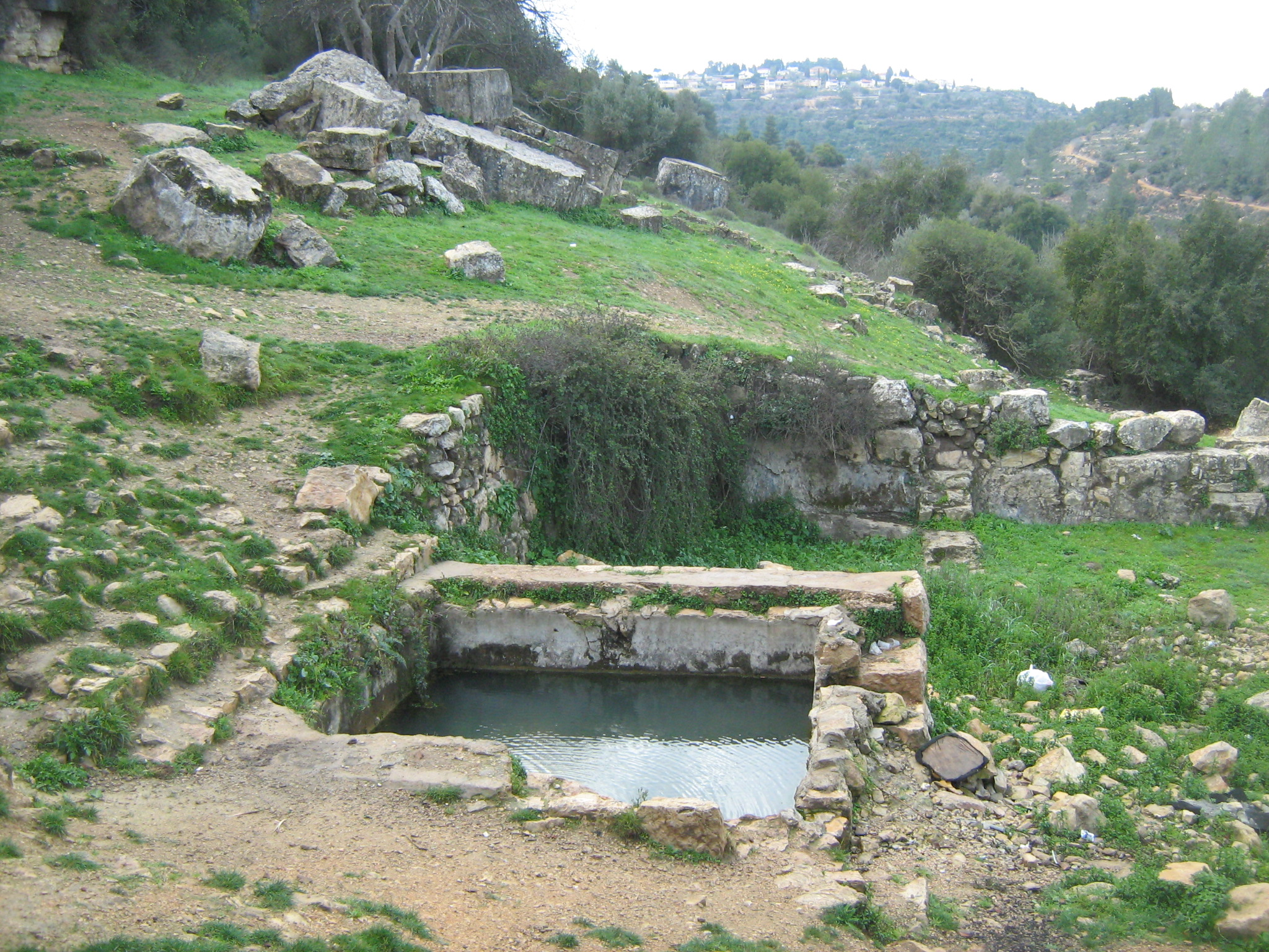 עין לימון